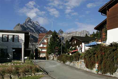 Dorfzentrum von Braunwald (Braunwaldbahn, Post, Bank ...)